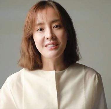 맑고 선한 배우, 박은혜가 독자 여러분께 인사 드립니다. 그녀의 이야기는 '우먼센스' 12월호에서 확인하세요.